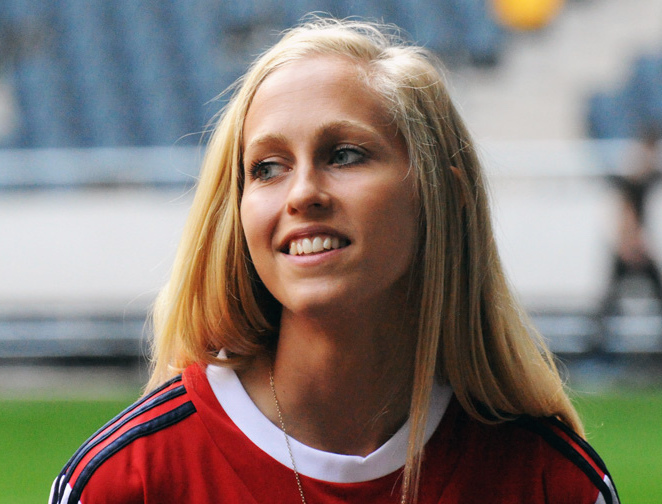 a_24_5945